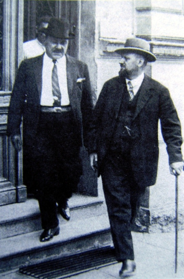 Атанас Буров и Александър Цанков